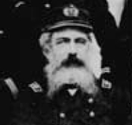 Eugenio Bachmann